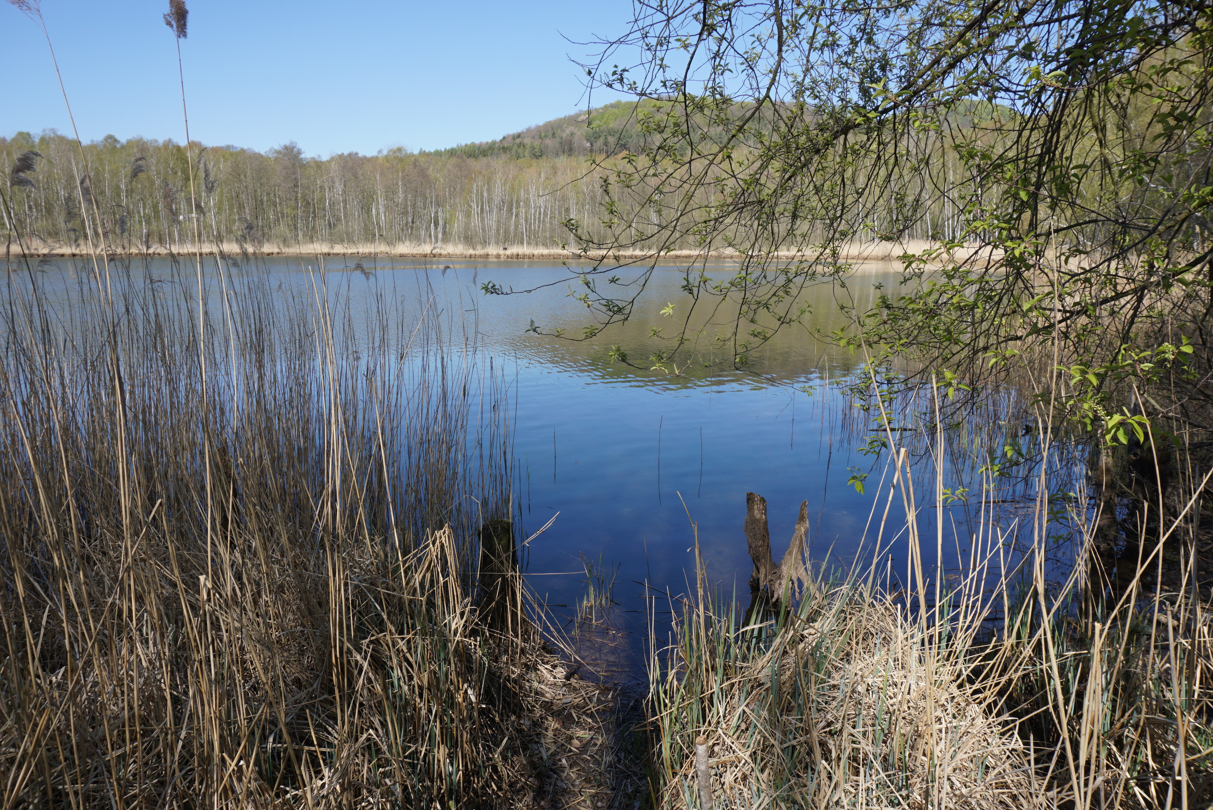 PP Červený rybník (duben 2020)